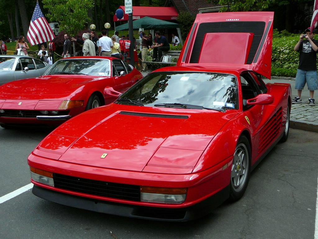 Ferrari Testarossa vuosimallia 1991.